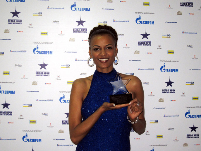 Francisca Urio beim Festival "White Nights of St.Petersburg". Sie bekommt den Preis als Bester Newcomer 2011.